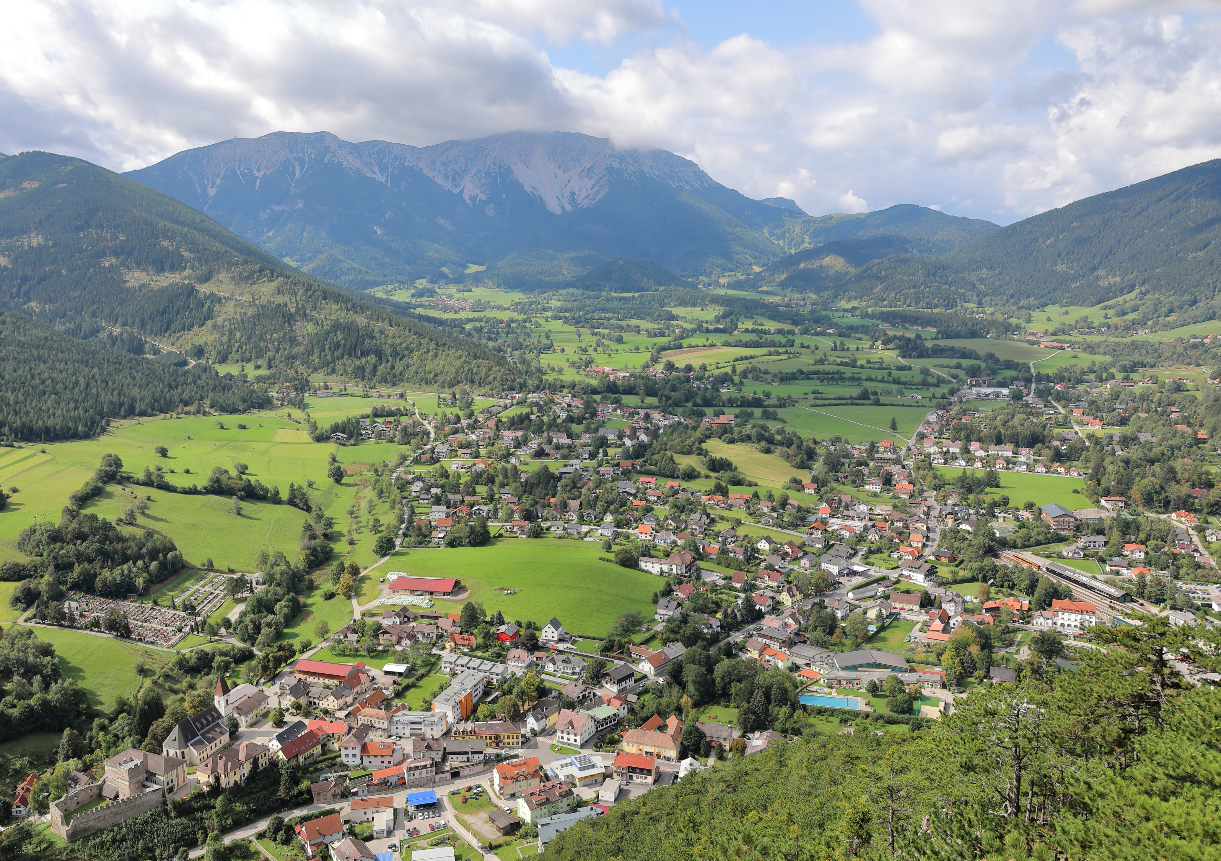 Ostansicht der niederösterreichischen Marktgemeinde Puchberg am Schneeberg mit dem Schneeberg im Hintergrund.